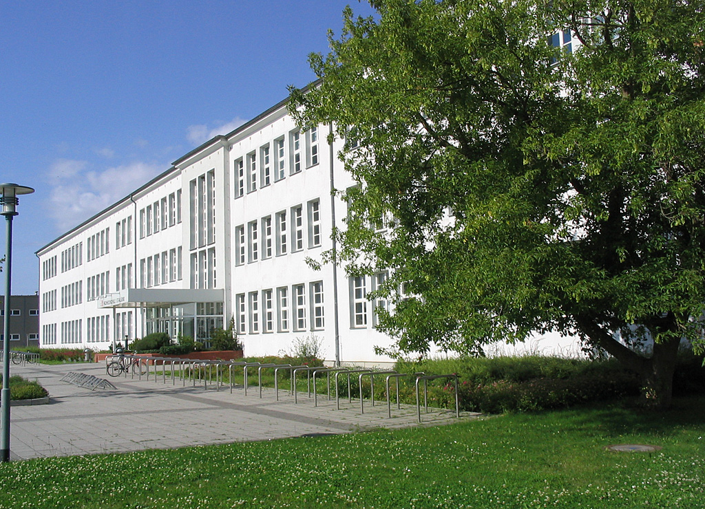 Beschreibung: Fachhochschule Stralsund - Haus 4 - Fachbereich Informatik/Elektrotechnik Fotograf: Darkone, 16. Juli 2004